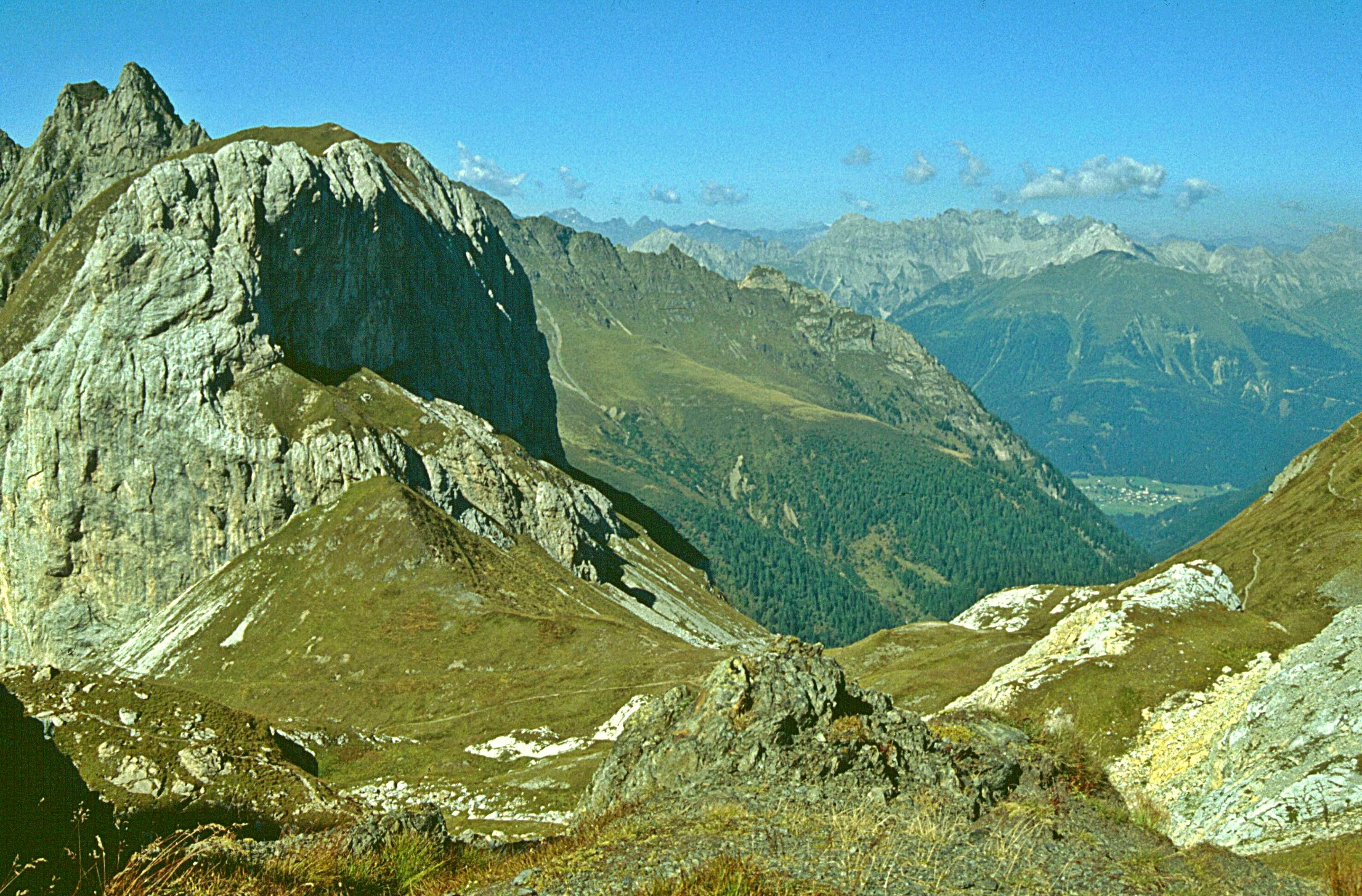 Karnische Alpen: Monte Peralba, Passo Sésis